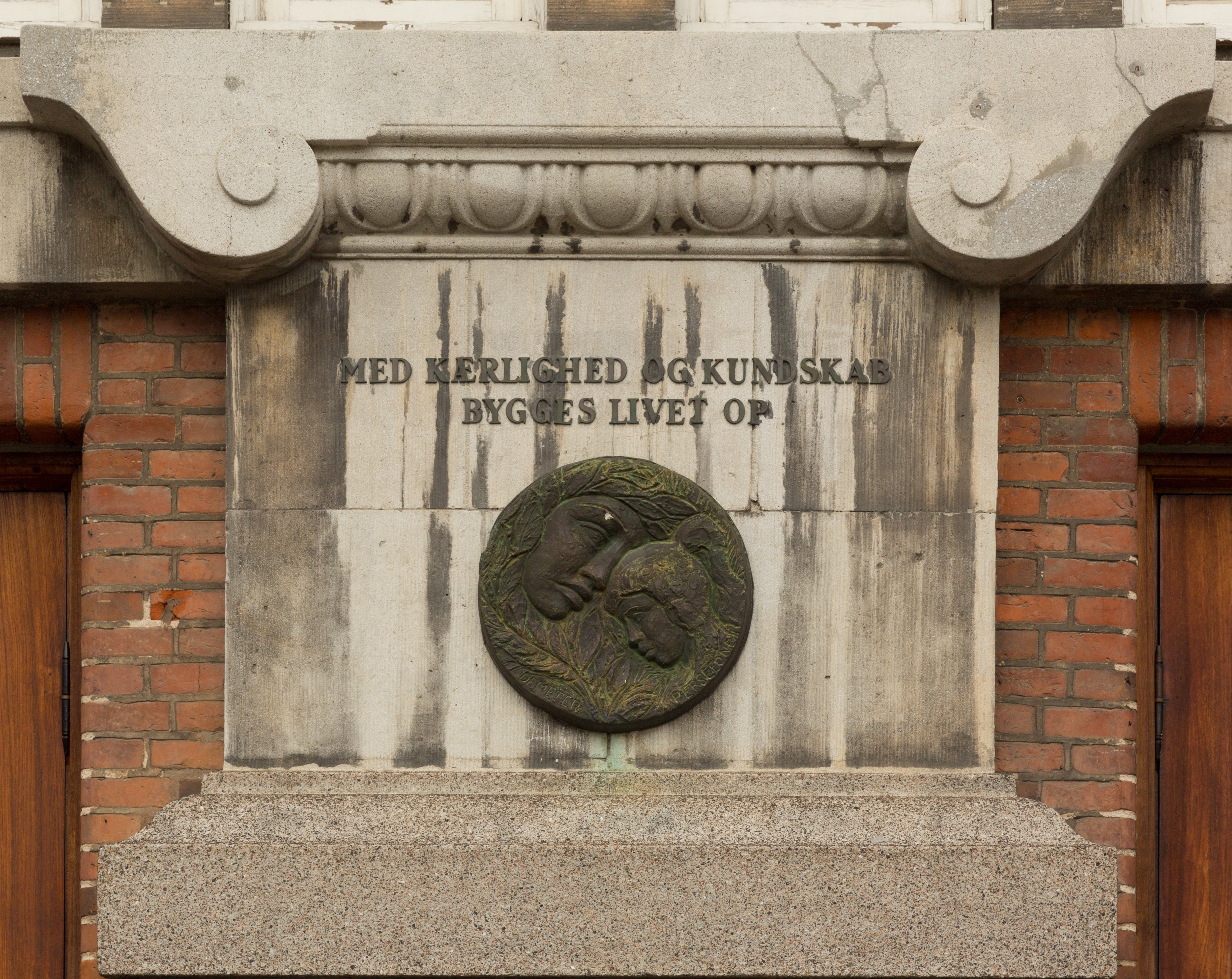 Motto ved indgangen